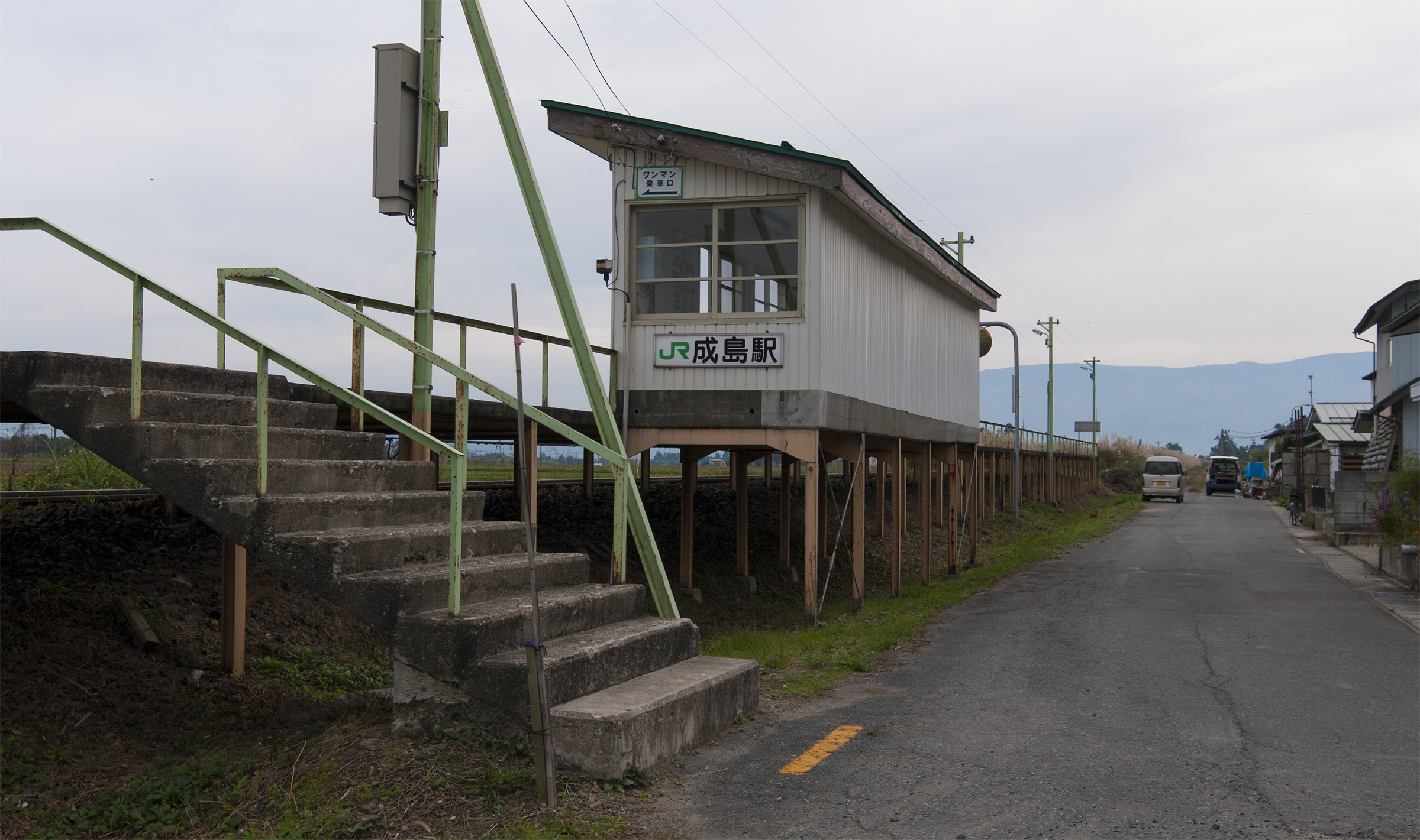 東日本旅客鉄道株式会社米坂線成島駅駅全景